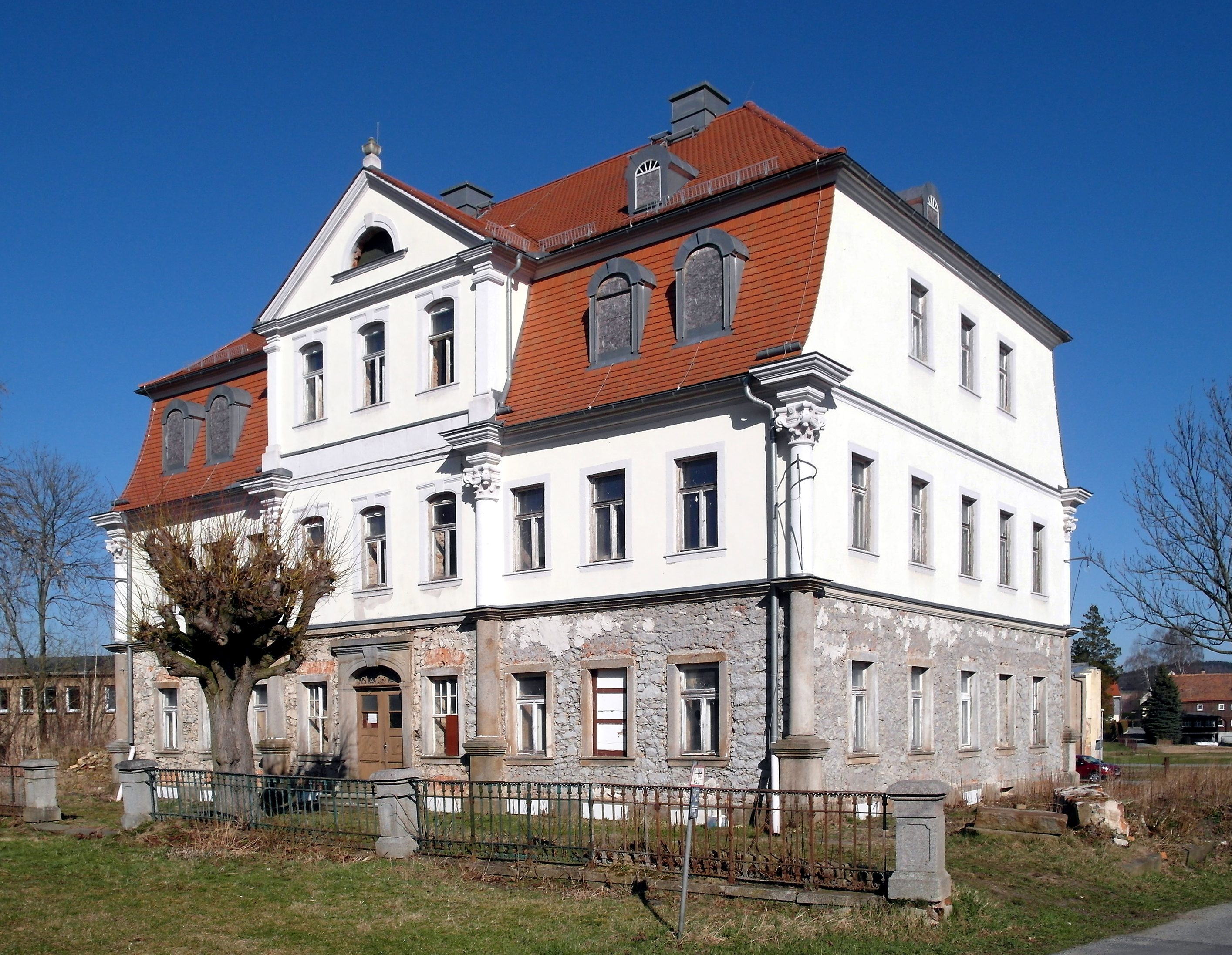 27.03.2017 02794 Oberleutersdorf (Leutersdorf) Siedlungsweg 2: Schloß Oberleutersdorf I, von 1828-1829 für Johann Gottfried Leberecht erbaut. Sicht von Südwesten. [SAM9021.JPG]20170327455DR.JPG(c)Blobelt